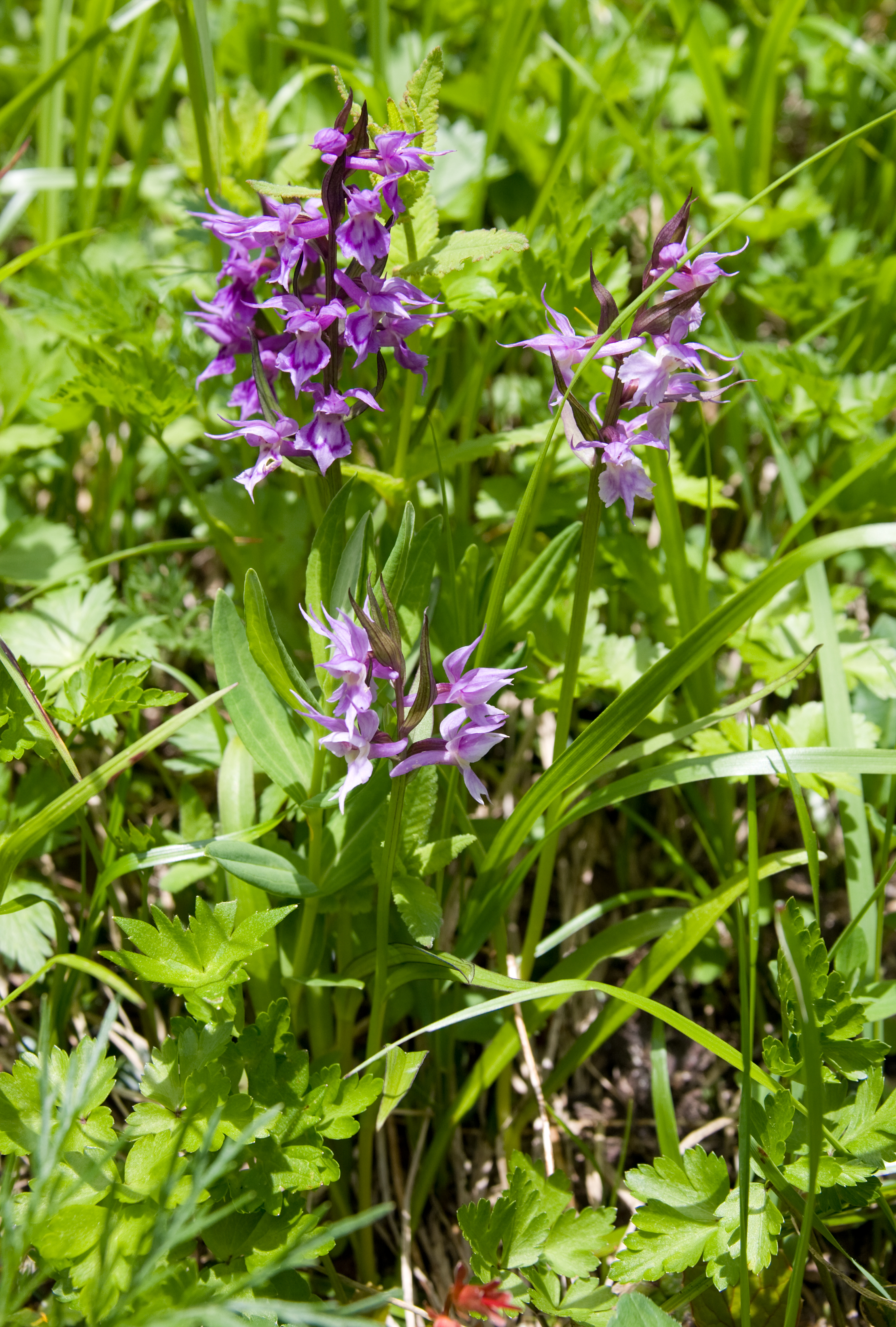 ハクサンチドリ (学名:Dactylorhiza aristata)